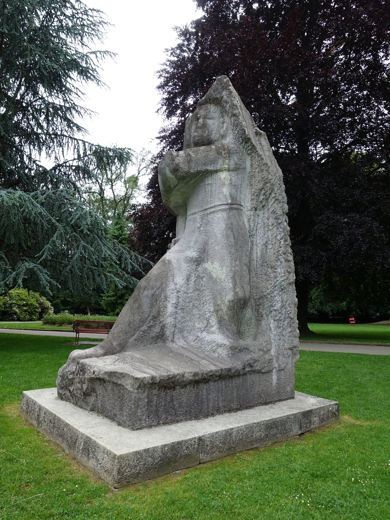 Hodler-Krieger oder Marignano-Krieger. 1944/1945. Das Denkmal war für Ferdiand Hodler vorgesehen, wurde jedoch als Soldatendenkmal durch General Guisan 1955 eingeweiht, Stadtpark Olten, Schweiz